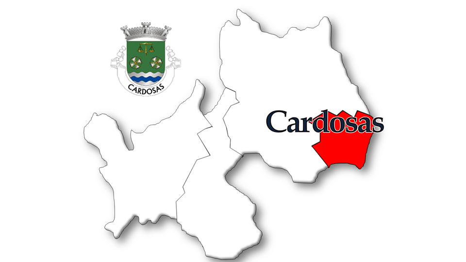 Evolução da População